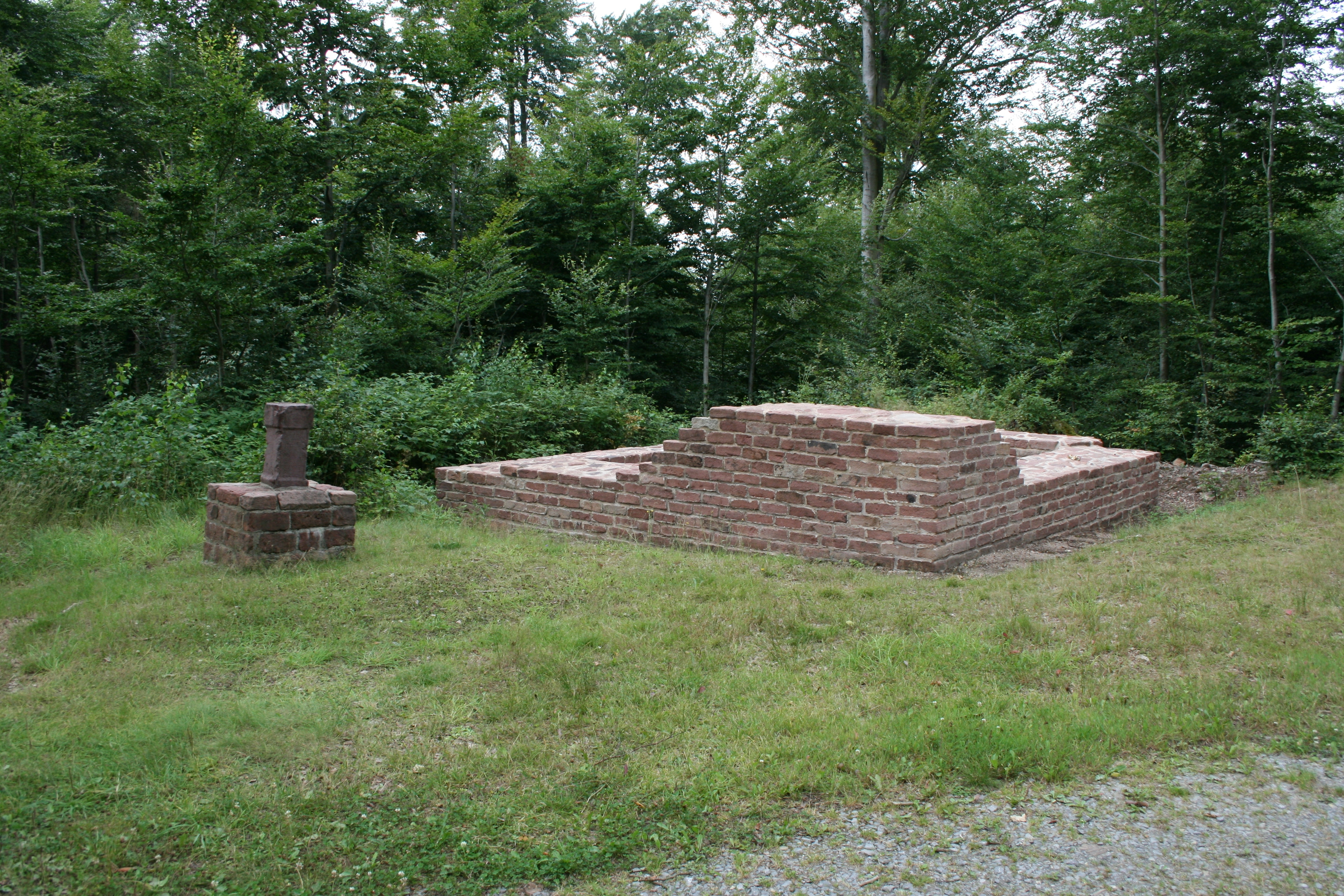 Limesturm Wp 10/37 "In der Schneidershecke" bei Schloßau. Westlicher Turm und Inschrift